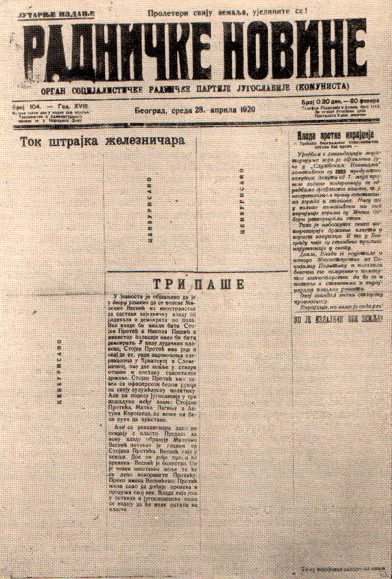 Srpskohrvatski / српскохрватски: Radničke novine od 28. aprila 1920. godine iz kojih je cenzura izbrisala izveštaje o generalnom štrajku železničara.